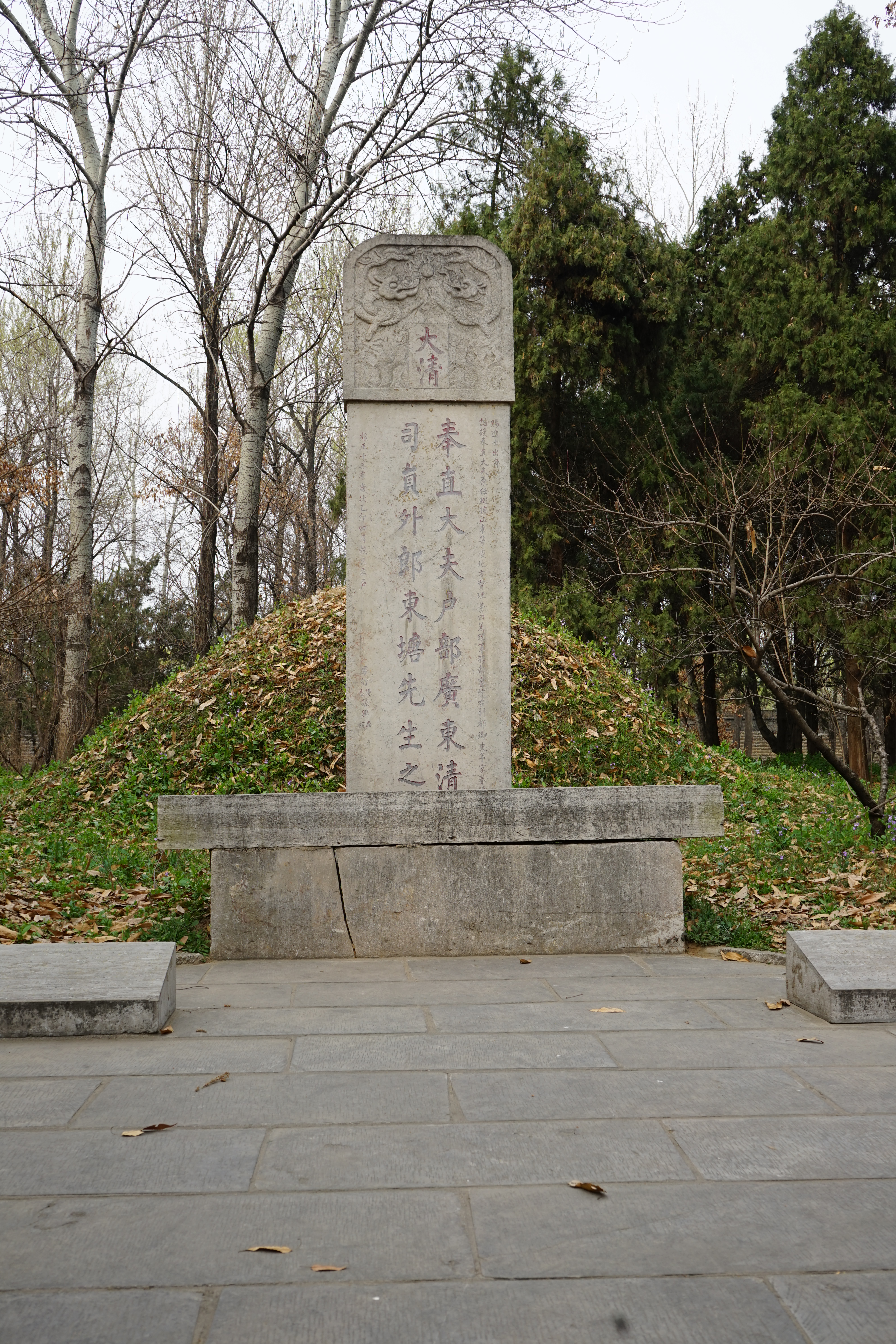 中文（中国大陆）: 孔尚任墓 孔林